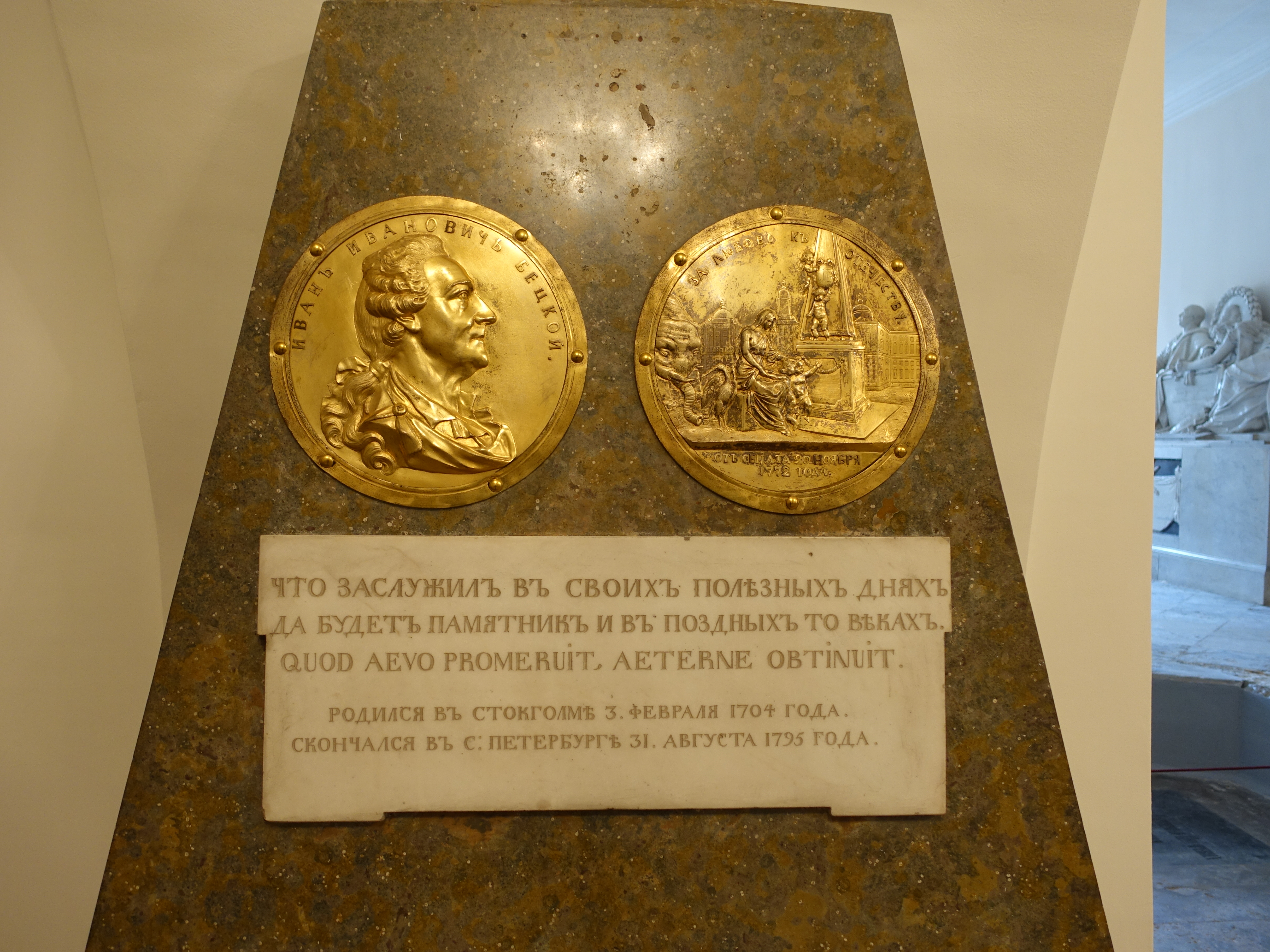 Бецкой Иван Иванович - надгробная плита - Лавра.JPG